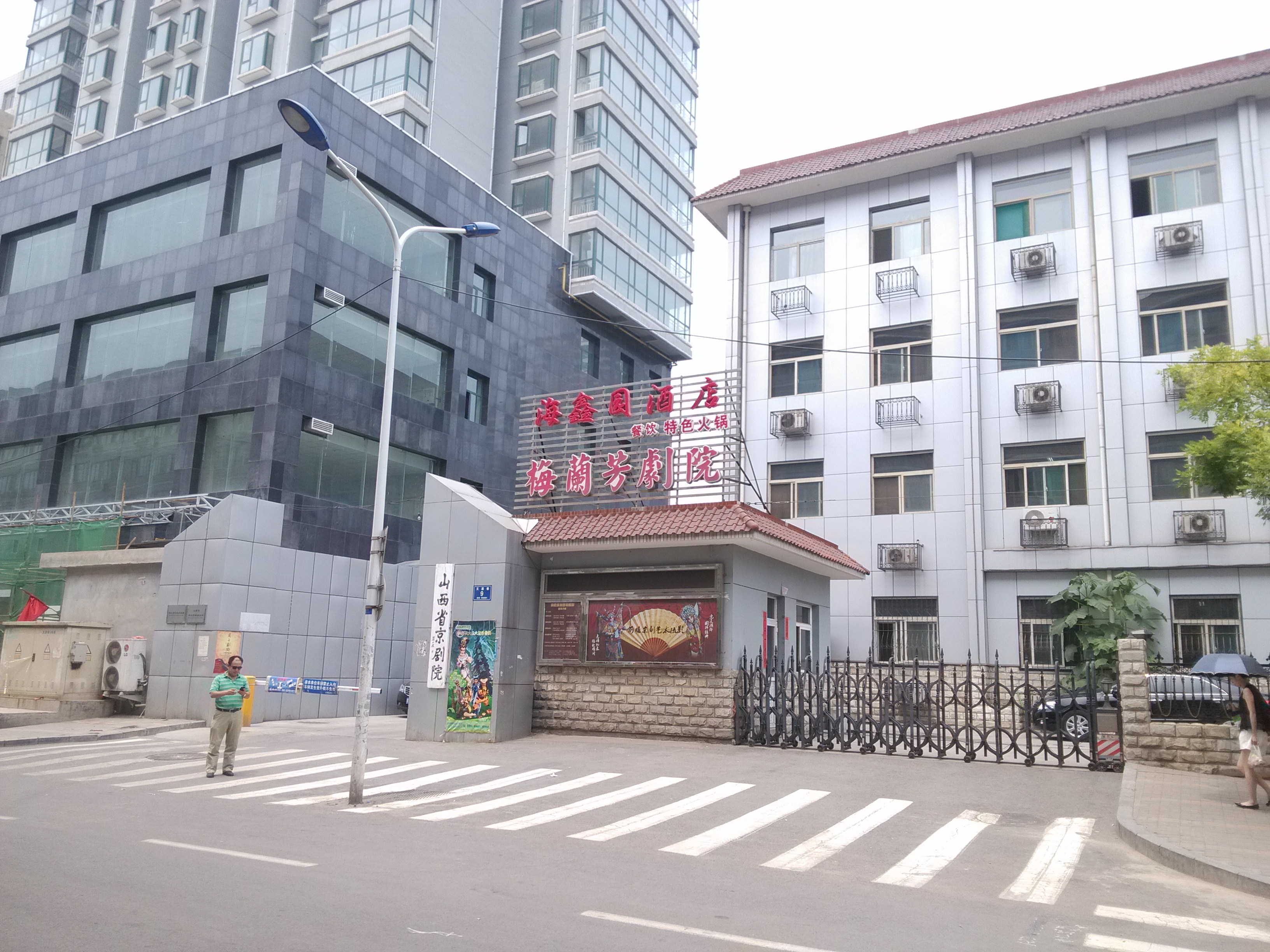 中文（中国大陆）: 山西省京剧院正门。